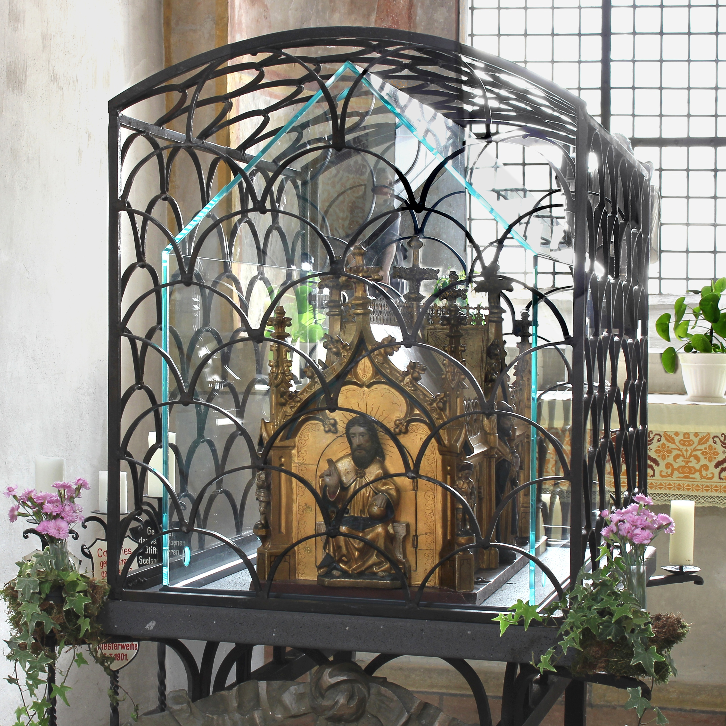 Castorschrein in der ehemaligen Stiftskirche St. Castor in Karden, 15. Jahrhundert, wiederhergestellt 1858, Tannenholz, matt vergoldet; Reliefs: Christus thronend und segnend, Maria mit dem Kind, St. Petrus und St. Castor. Schmiedeeisernes Gehäuse 1954 nach einer Zeichnung des Bistumsarchitekten Kraemer, Trier, gefertigt von Felix Vallendar, Karden. Der Schrein soll Reliquien des hl. Castor enthalten, der in der Zeit um 400 in Karden lebte und wirkte.